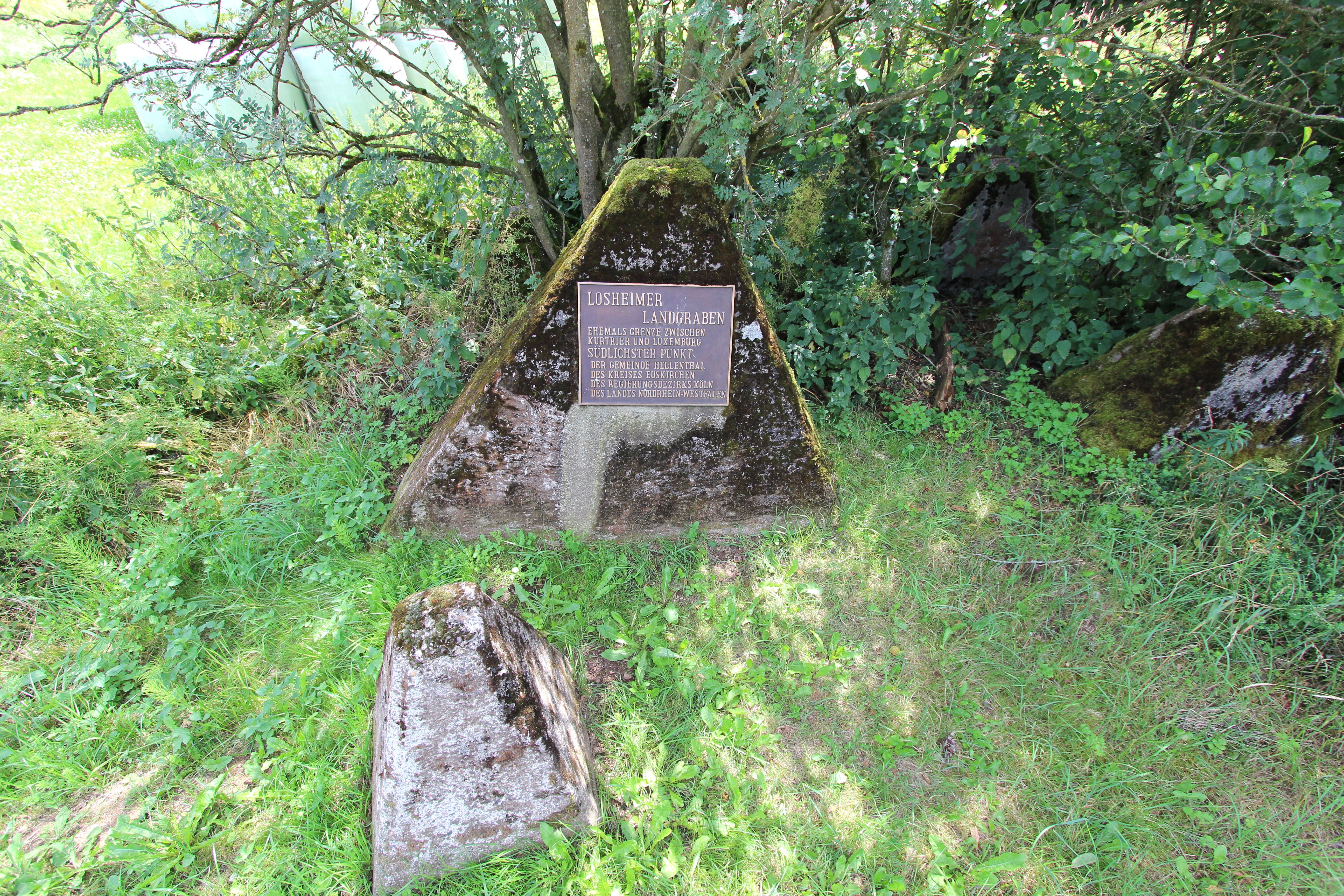 54597 Roth bei Prüm. Nordöstlich des Ortes am Gemarkungsrand. Der Losheimer Graben war ehemals die Grenze zwischen Kurtrier und Luxemburg. Es ist der südlichste Punkt von NRW. Aufnahme von 2017.